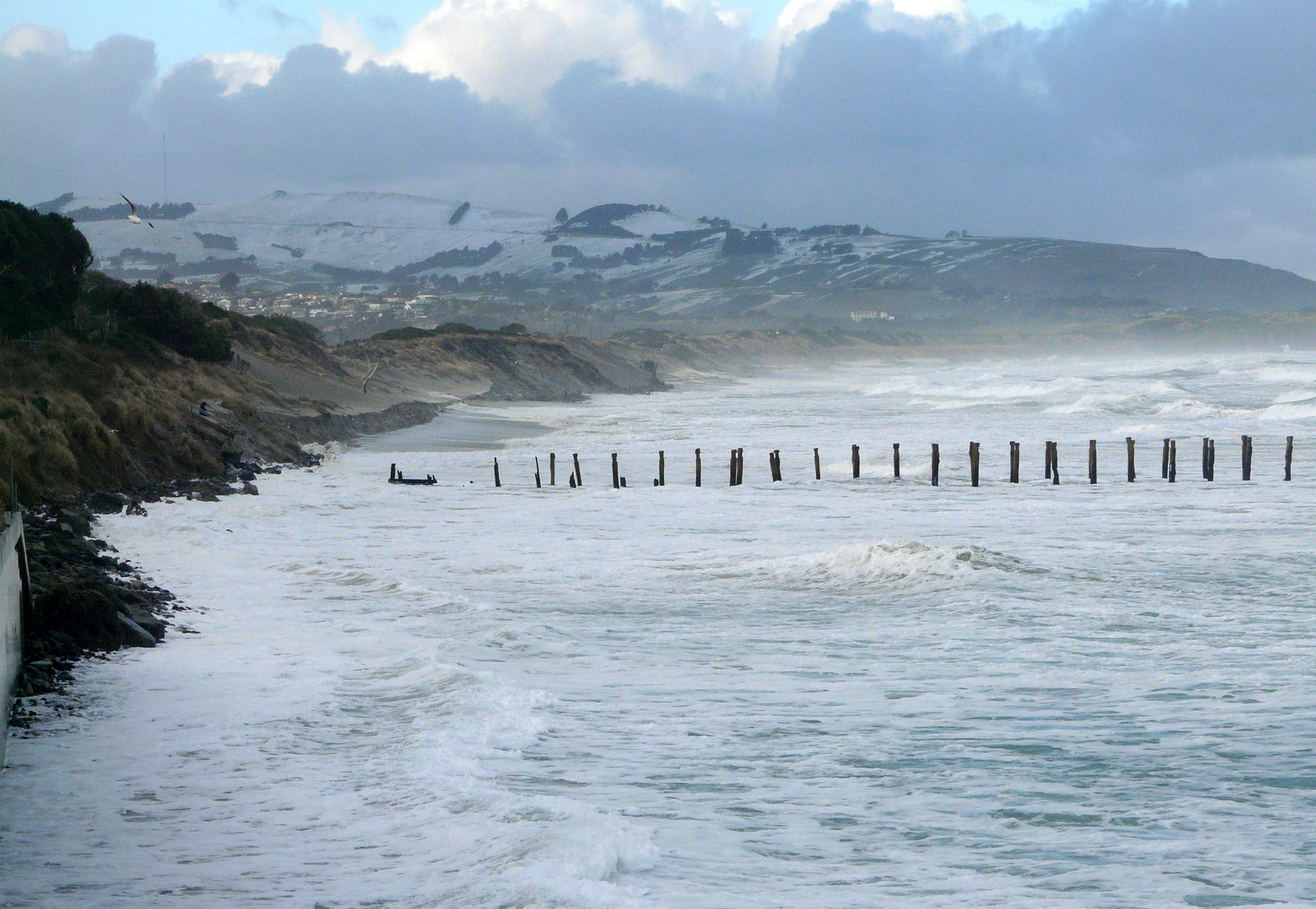 érosion d'une dune littorale lors d'une tempête en Nouvelle-Zélande Unknown coastal dune erosion during a storm in new-zealand